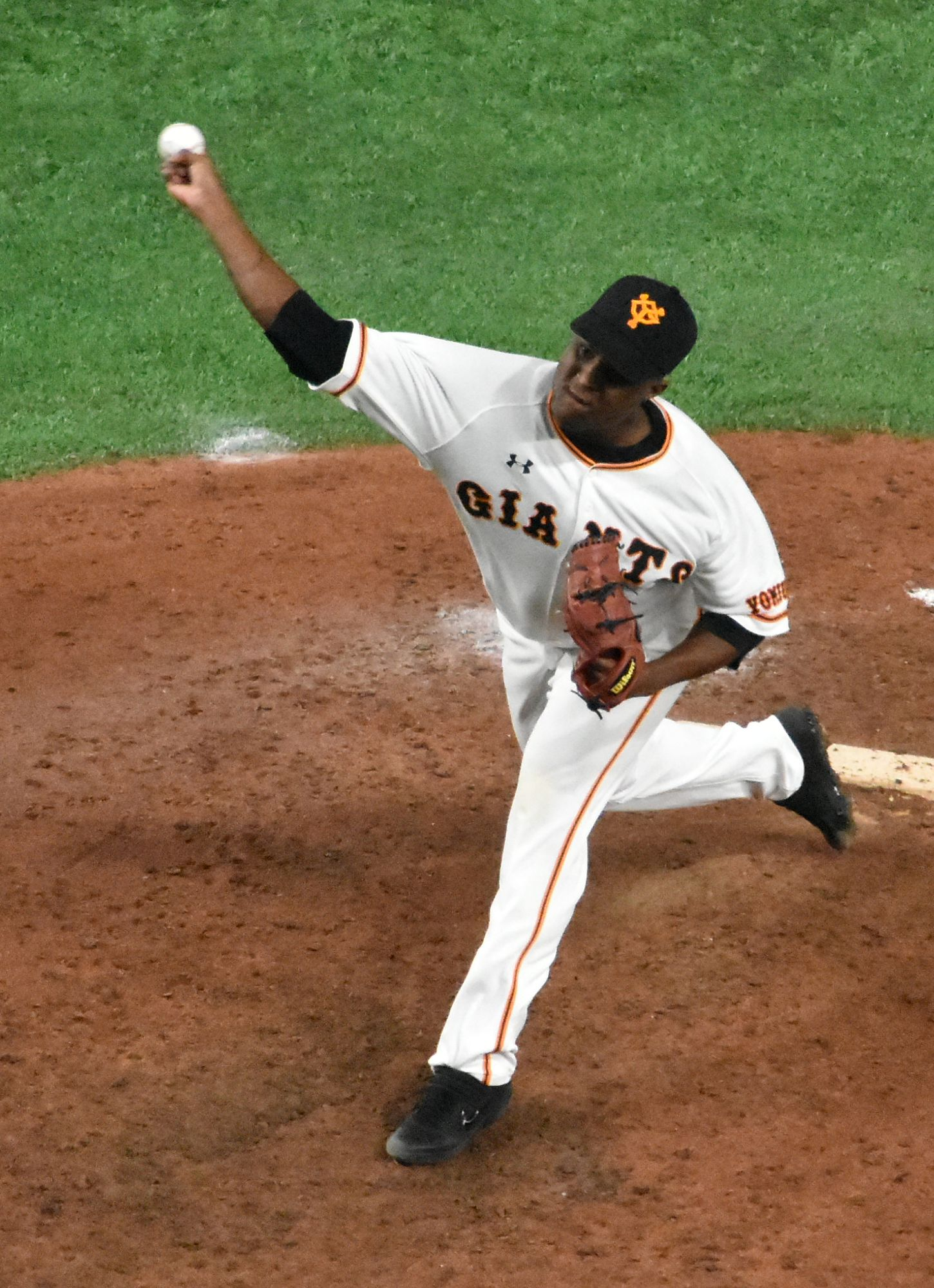 ルビー・デラロサ